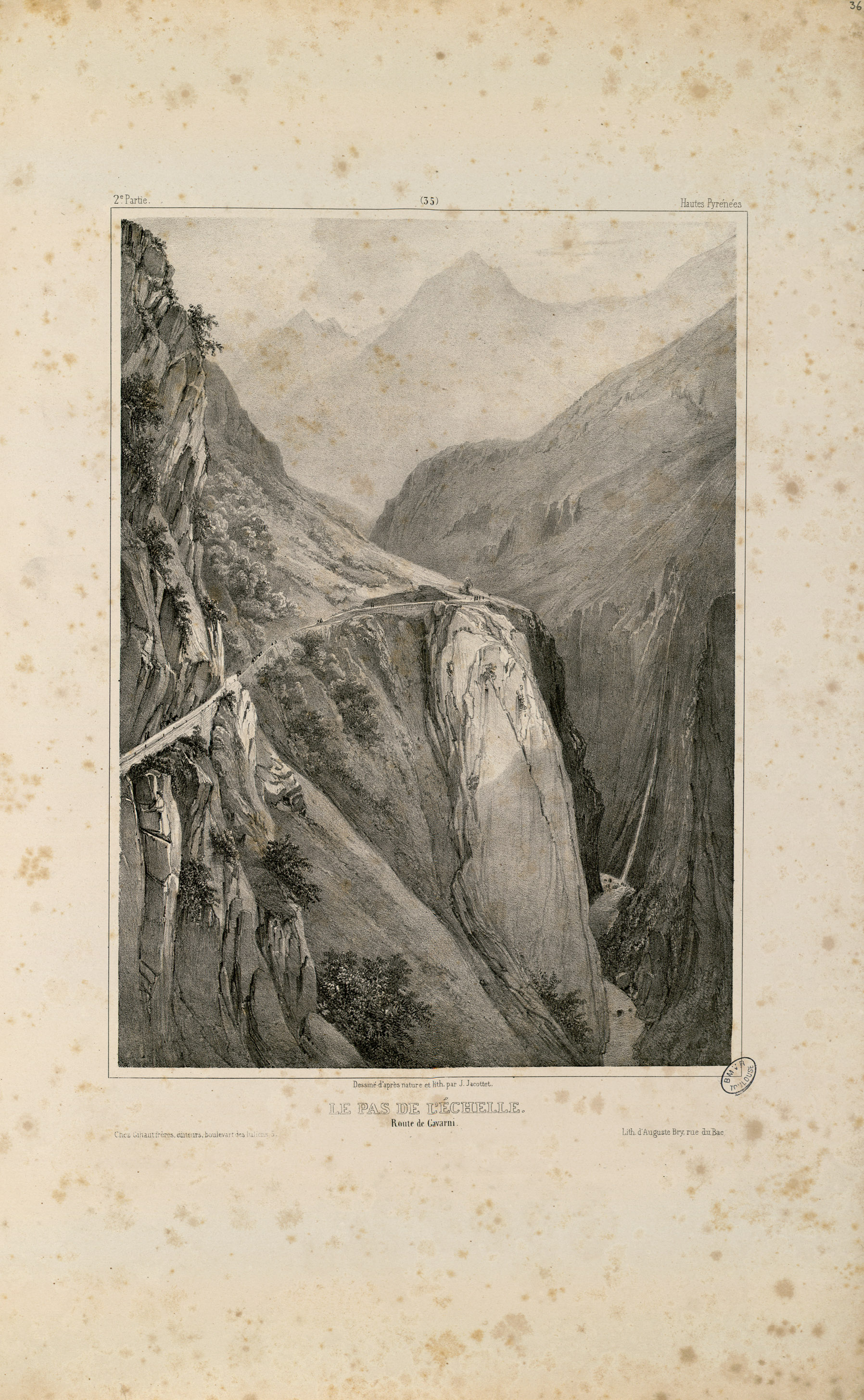 Fait partie de la deuxième partie du recueil "Souvenirs des Pyrénées". Titre lithographié et 51 lithographies. Sur la couverture, l'adresse du lithographe est différente de celle de la page de titre : rue du Bac, 134. Les personnages qui animent les vues ont été dessinés par A. Bayot. Le lithographe de cette deuxième partie est Auguste Bry. L'ouvrage de Jacottet est très rare quand il est complet des deux parties. Vignette lithographiée au titre : "La Roche du Limaçon. Route de Cauterets" Ancely, René (1876 - 1966). Possesseur